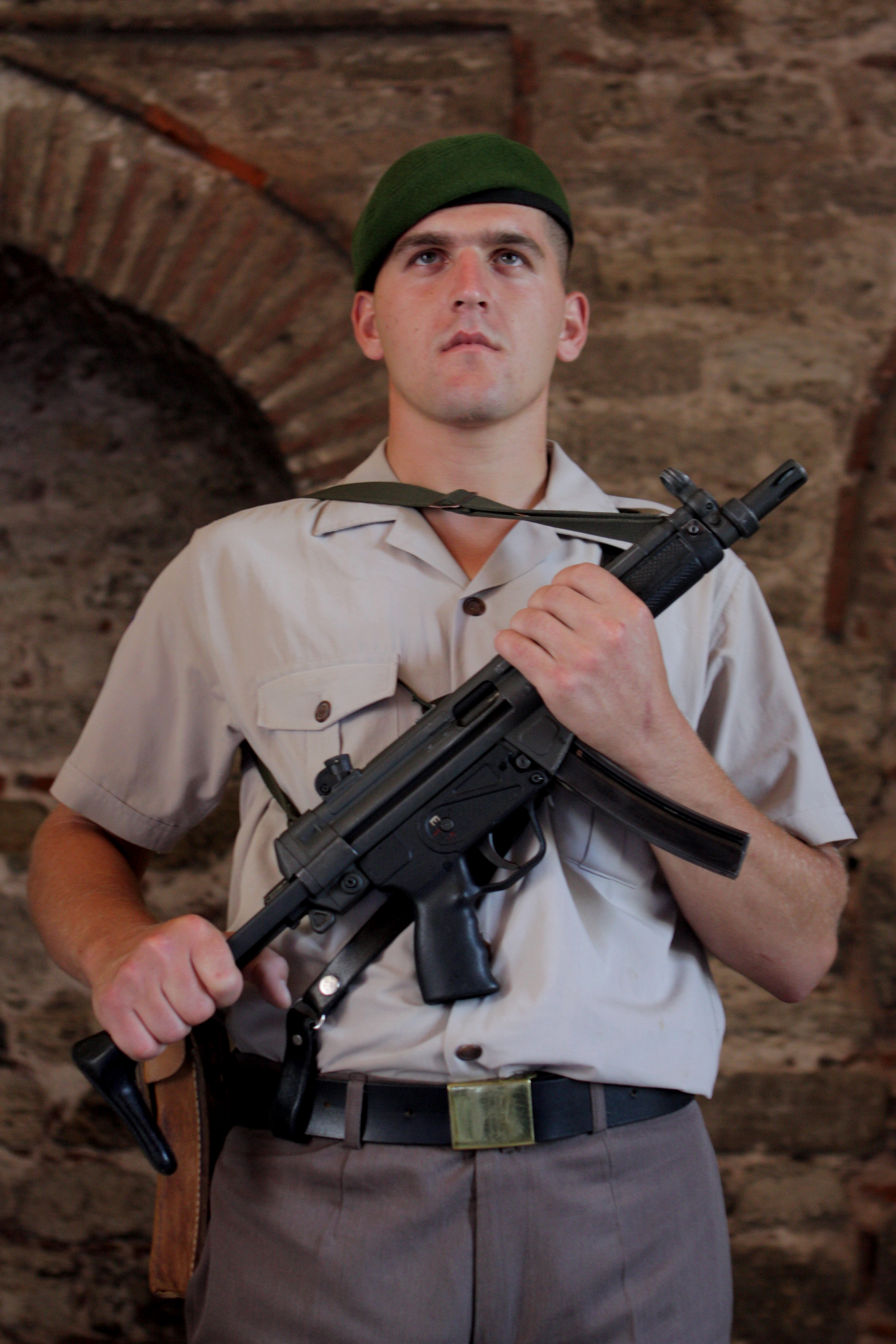 İstanbul Topkapı Sarayı'nda nöbet tutan bir Jandarma Eri.